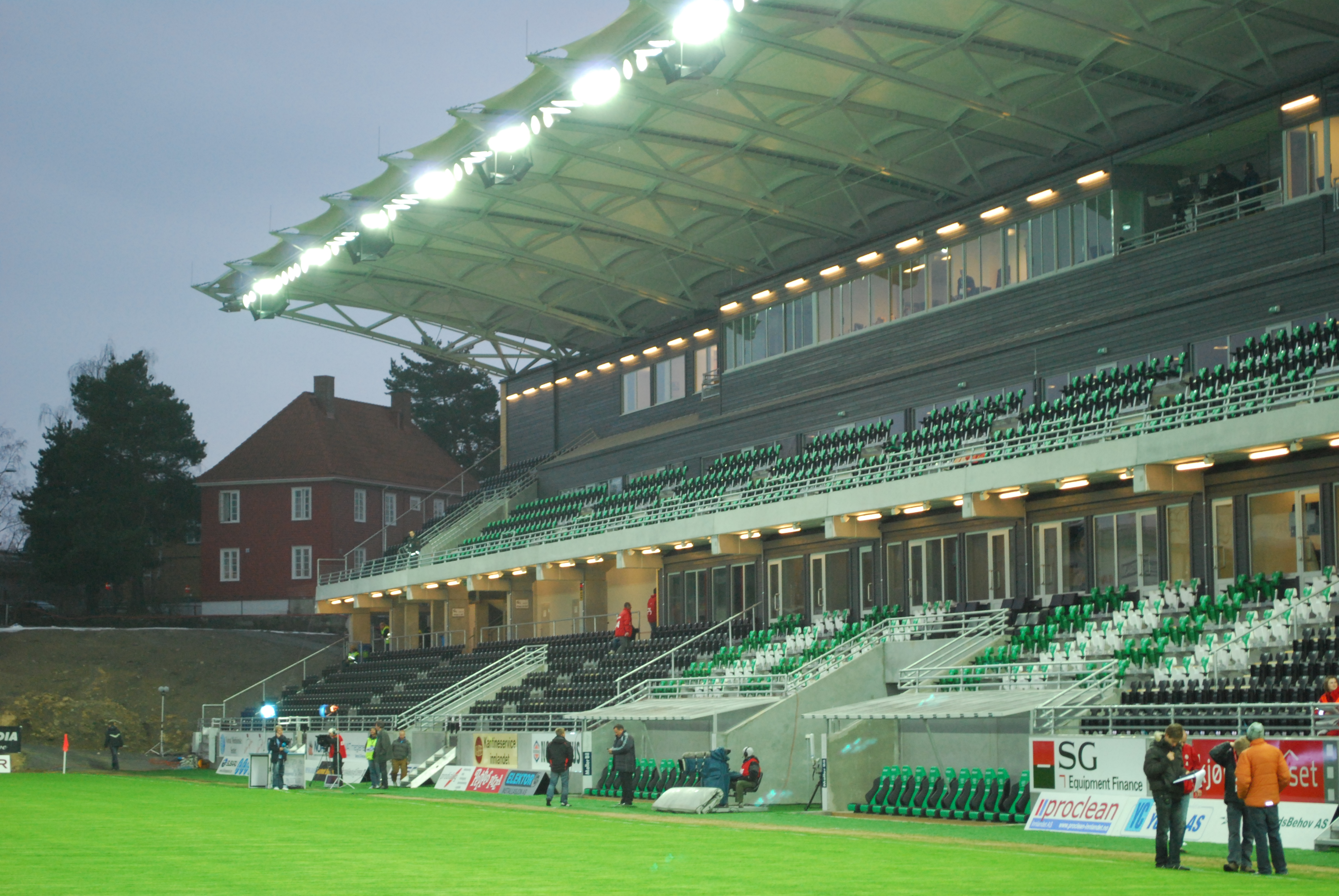 Vestre sittetribune ved Briskeby gressbane på Hamar.